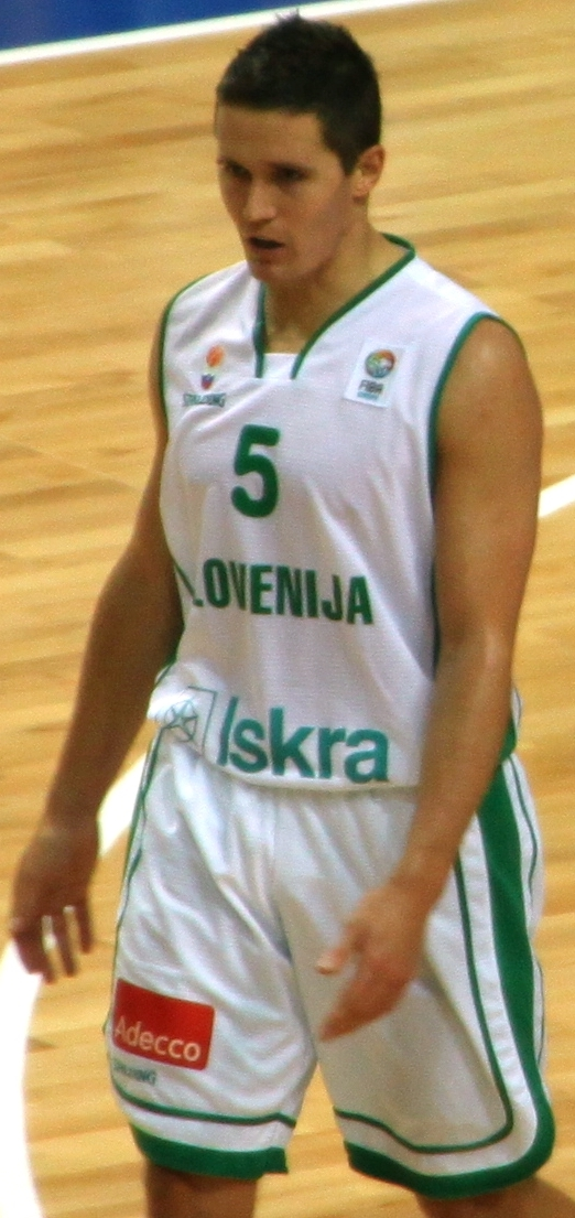 Jaka Lakovič at Slovenia - Croatia at Eurobasket 2009